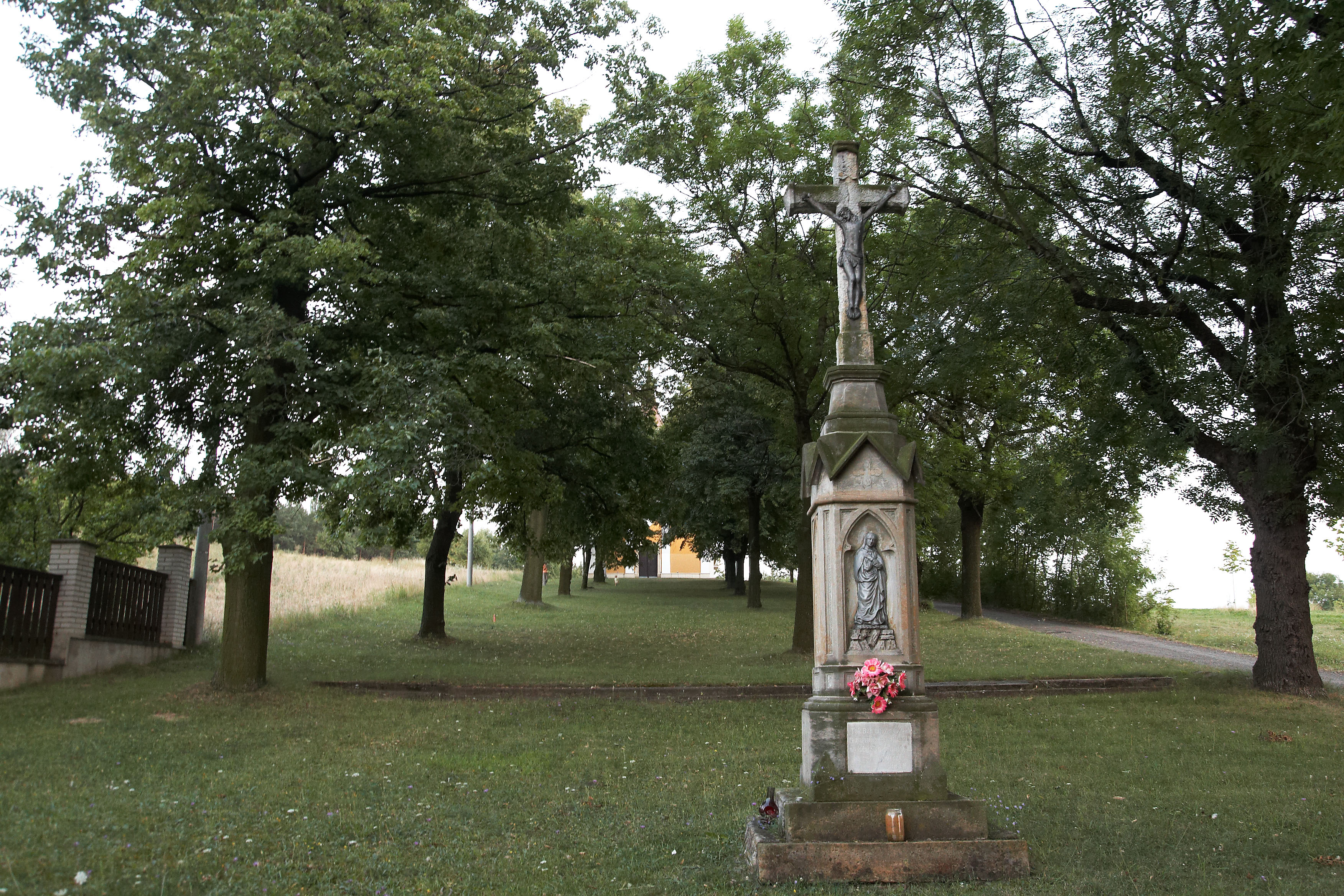 Němčany, Lutršték, cesta ke kostelu